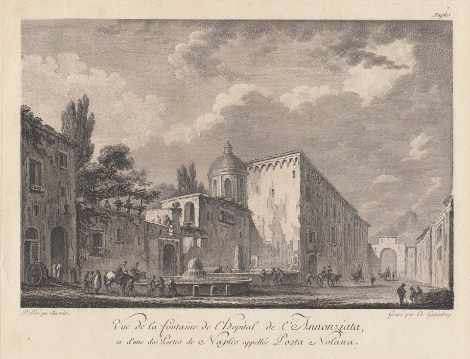 "Vue de la fontaine de l'Hopital de l'Annunziata et d'une des Portes de Naples, appellée Porta Nolana". Incisione forse nell'opera dell'Abbé de Saint-Non.